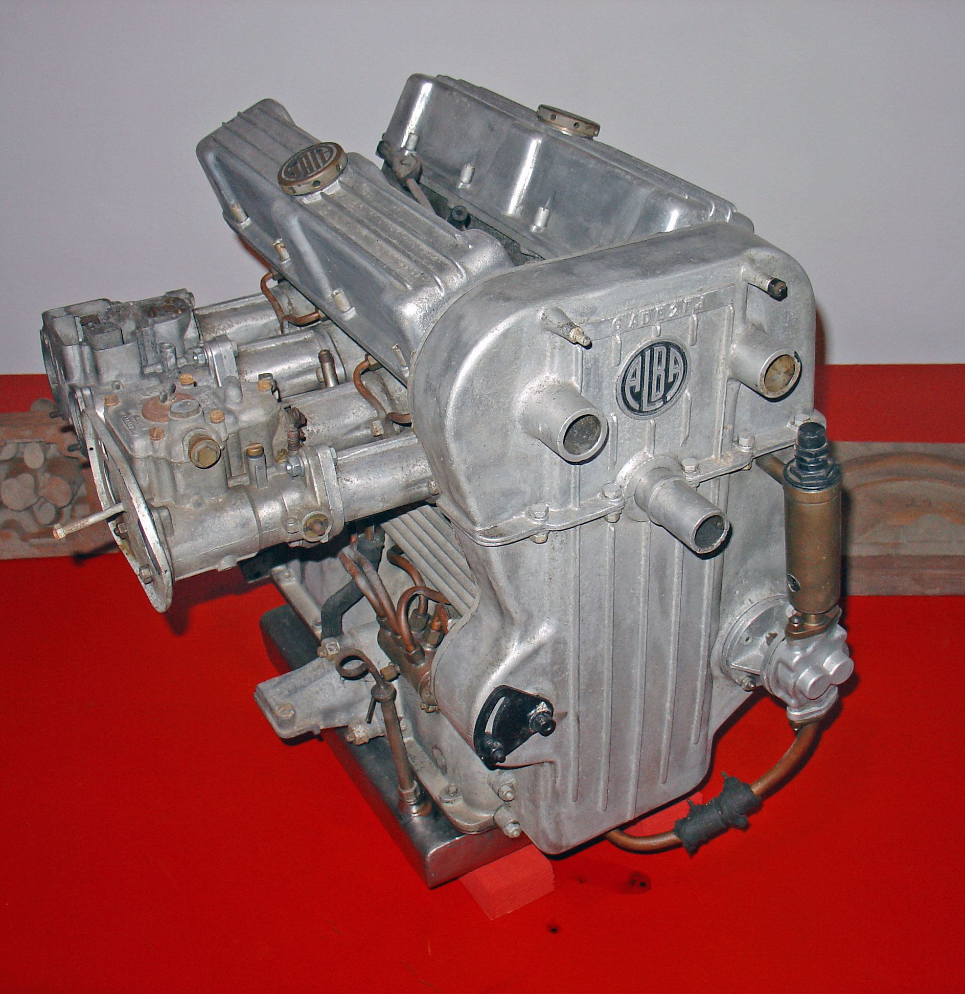 Motor Alba 1500 em exposição no Museu do Caramulo